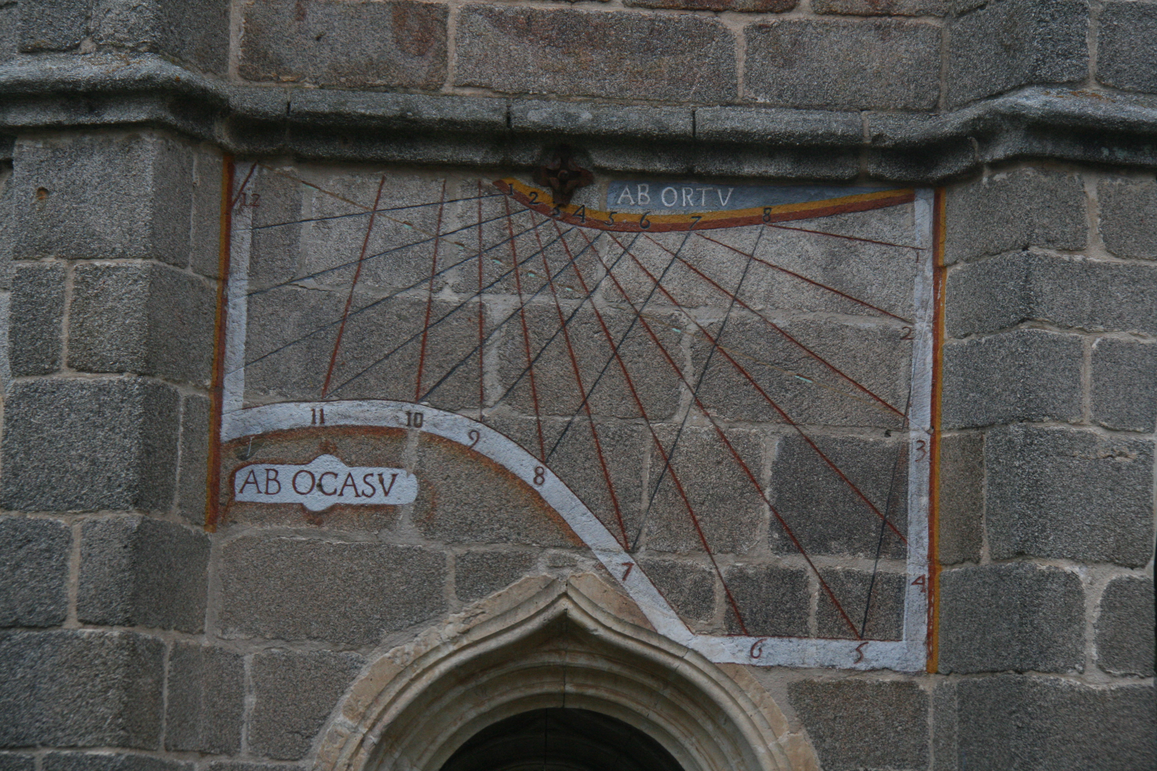 Reloj de Horas Itálicas y Babilónicas - Torre del Agua - Monasterio del Paular